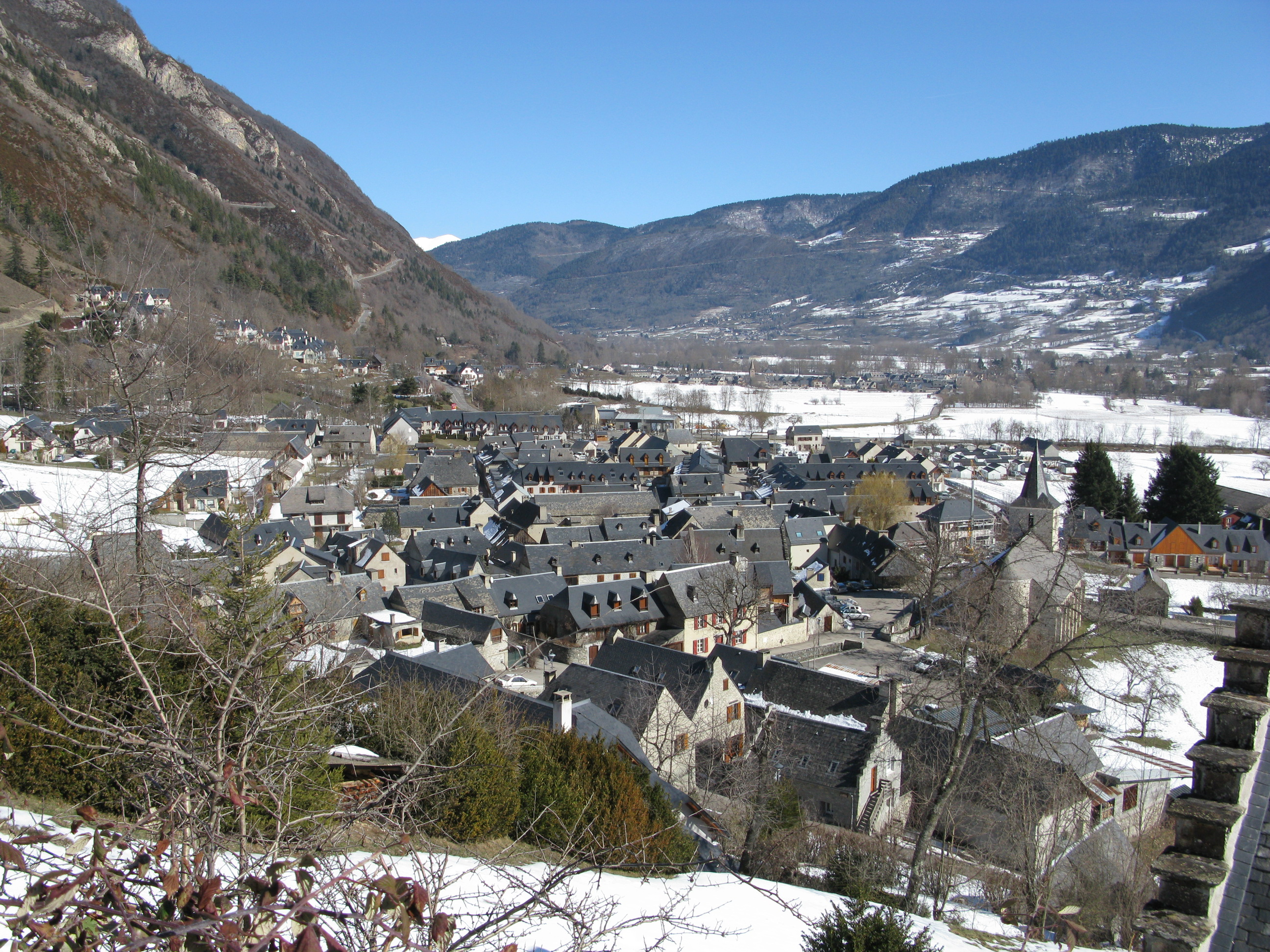 Vignec